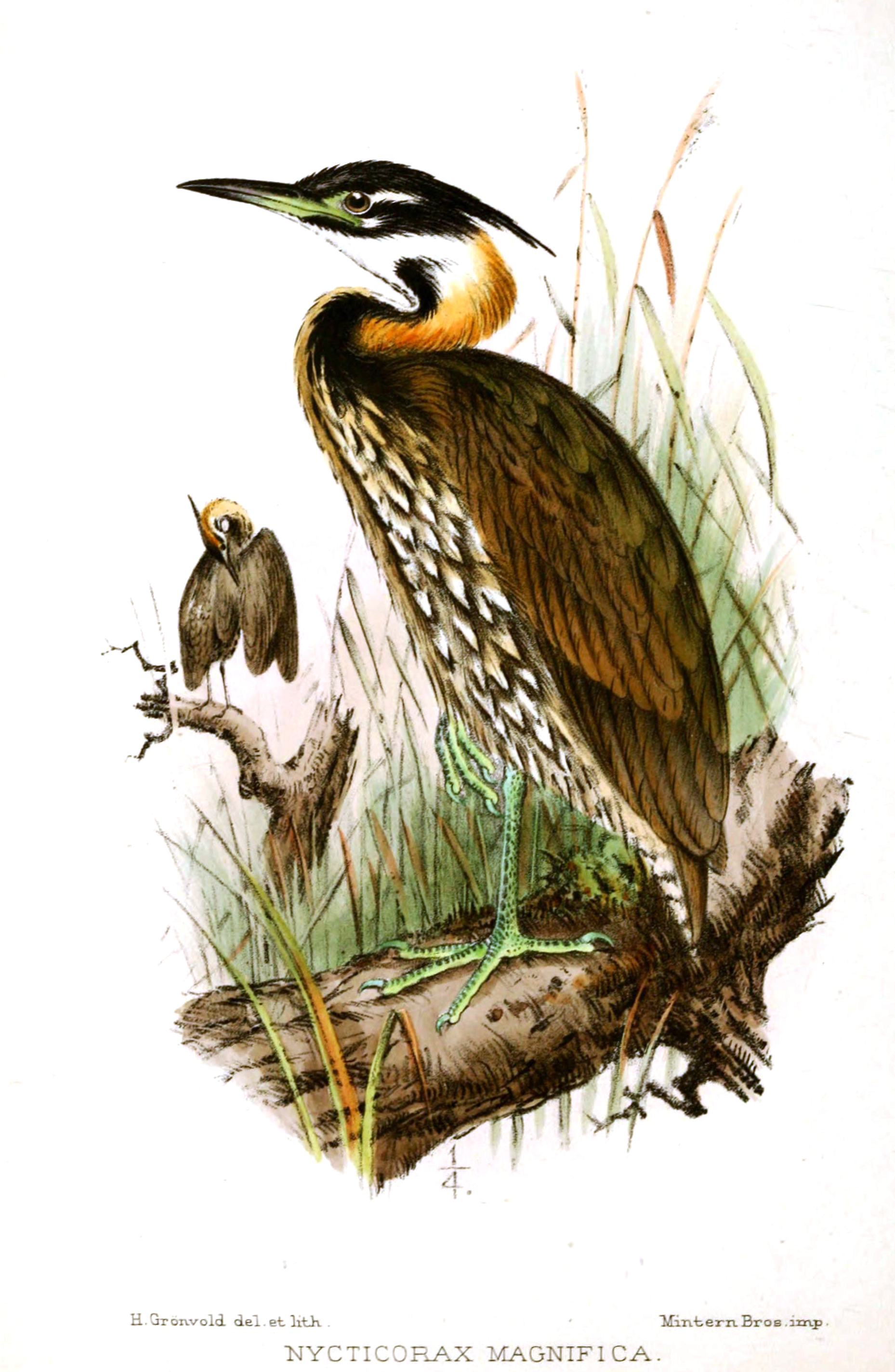 Nycticorax magnifica = Gorsachius magnificus